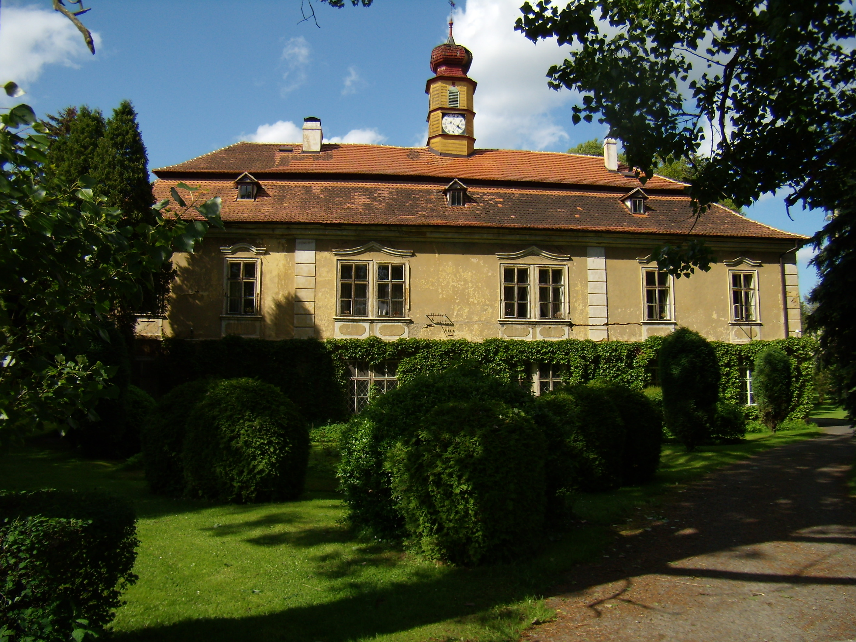 Úlice - zámek 1